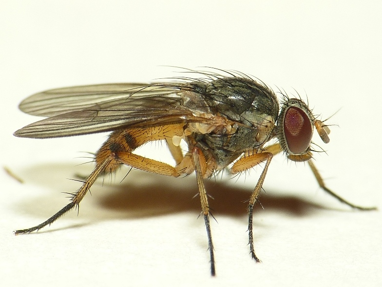 Piezura graminicola, location: The Netherlands - Rhenen - Blauwe Kamer - Gelderland